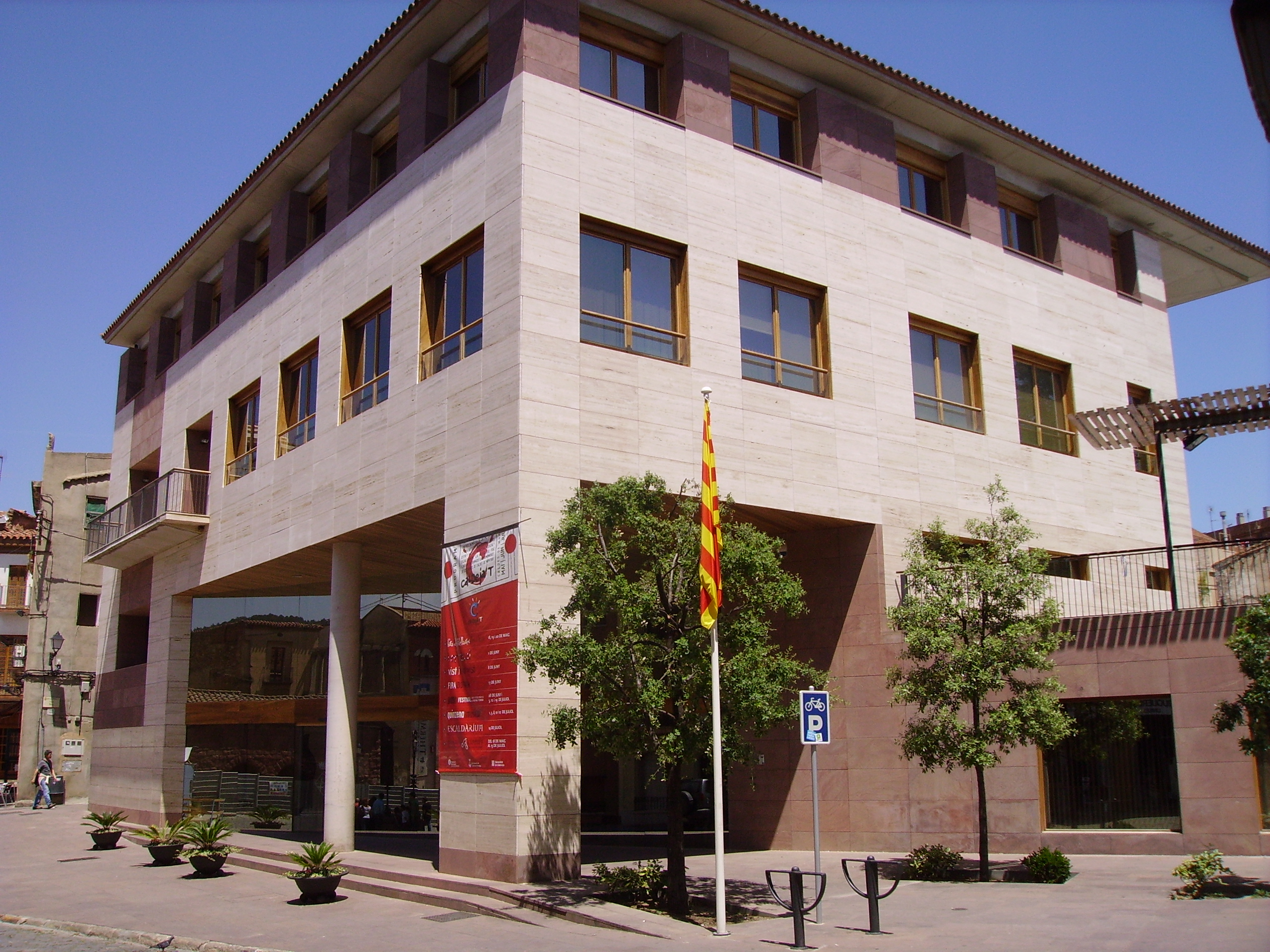 Ajuntament de Caldes de Montbui, Vallès Oriental, Catalunya.